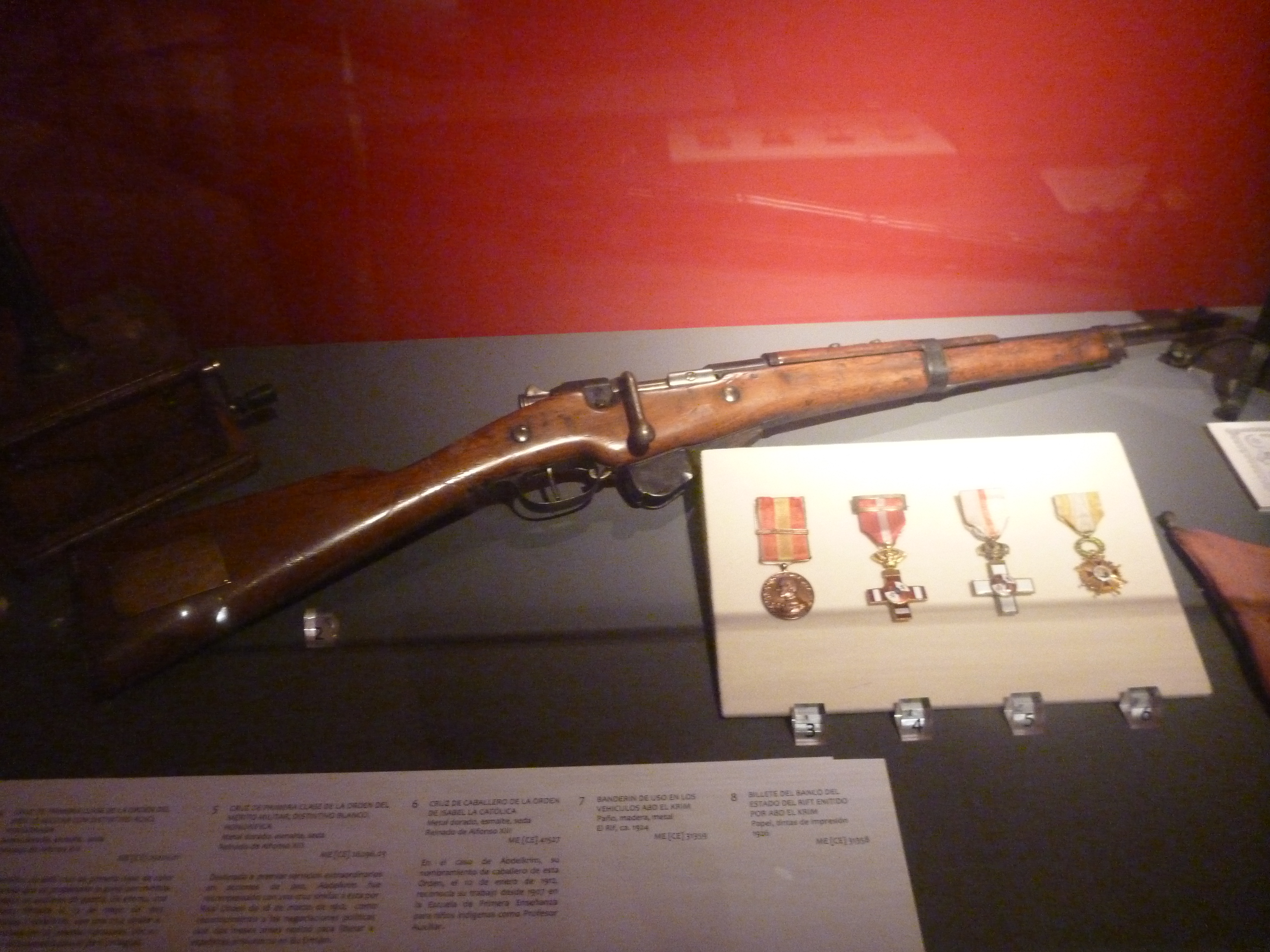 Un fusil Berthier M1916